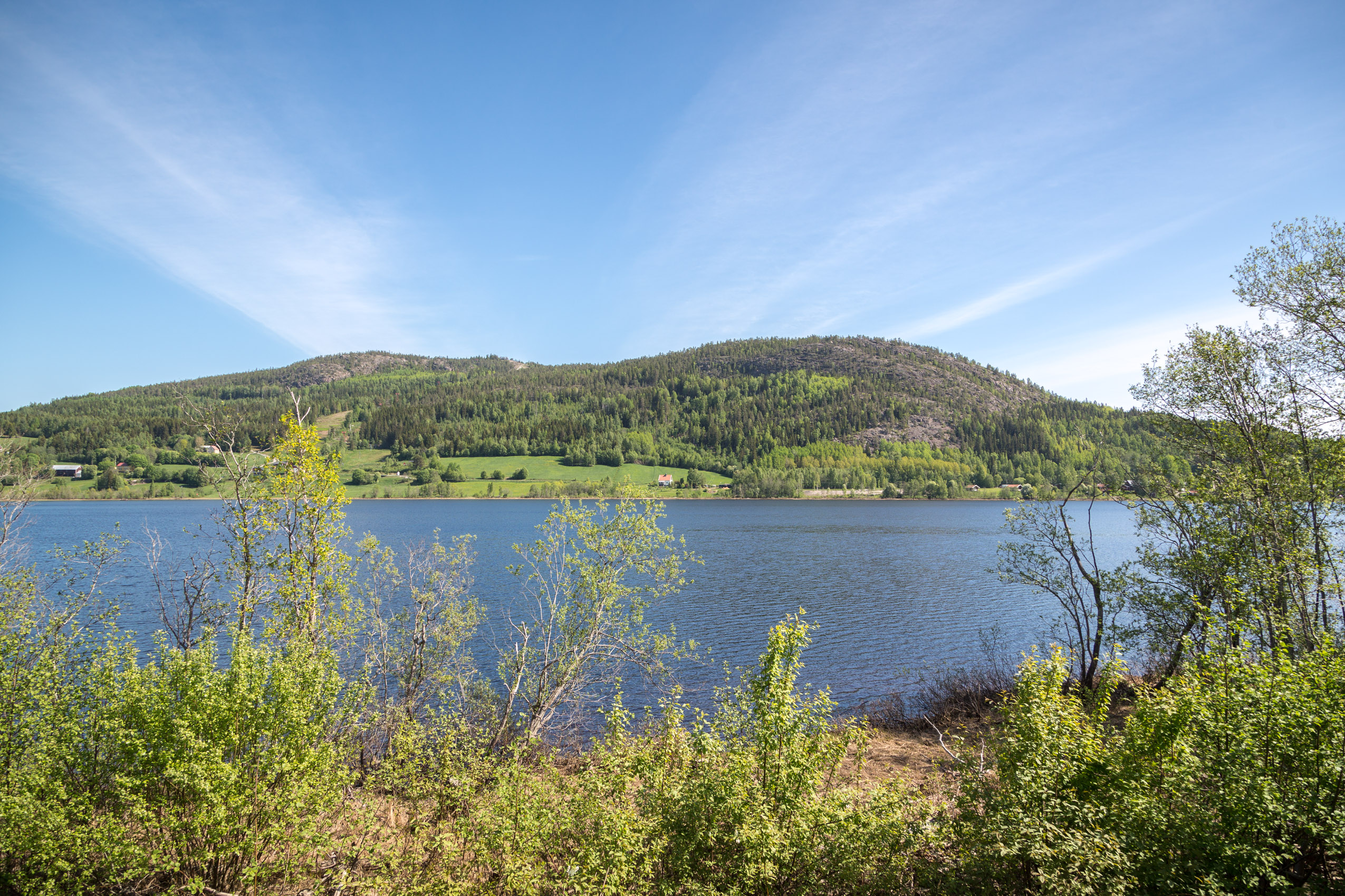 Gällstasjön inramad av Skuleberget.